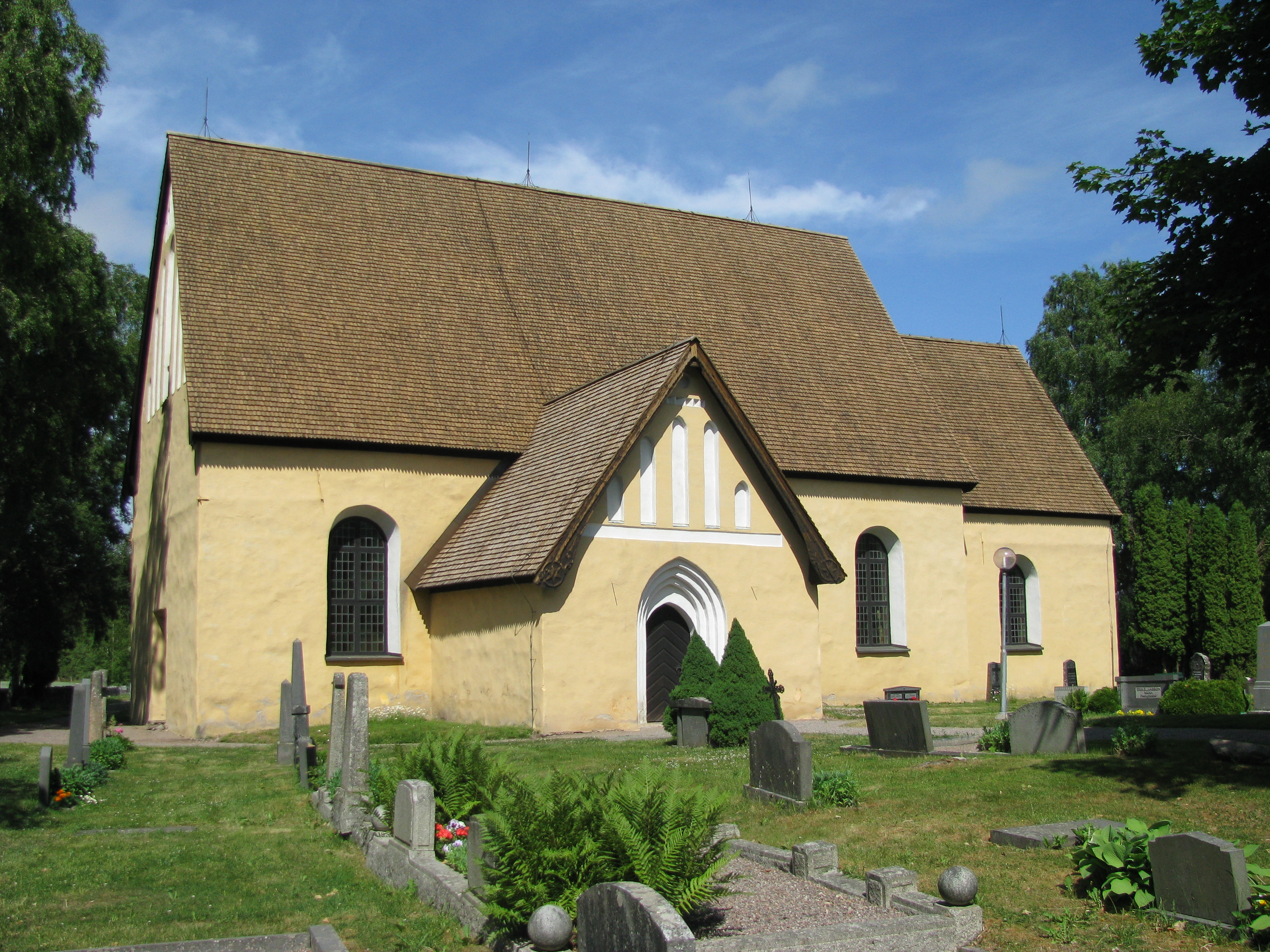 Ärentuna kyrka norr om Uppsala.